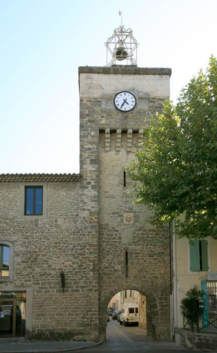 the village of Sainte-Cécile-les-Vignes, Vaucluse, France